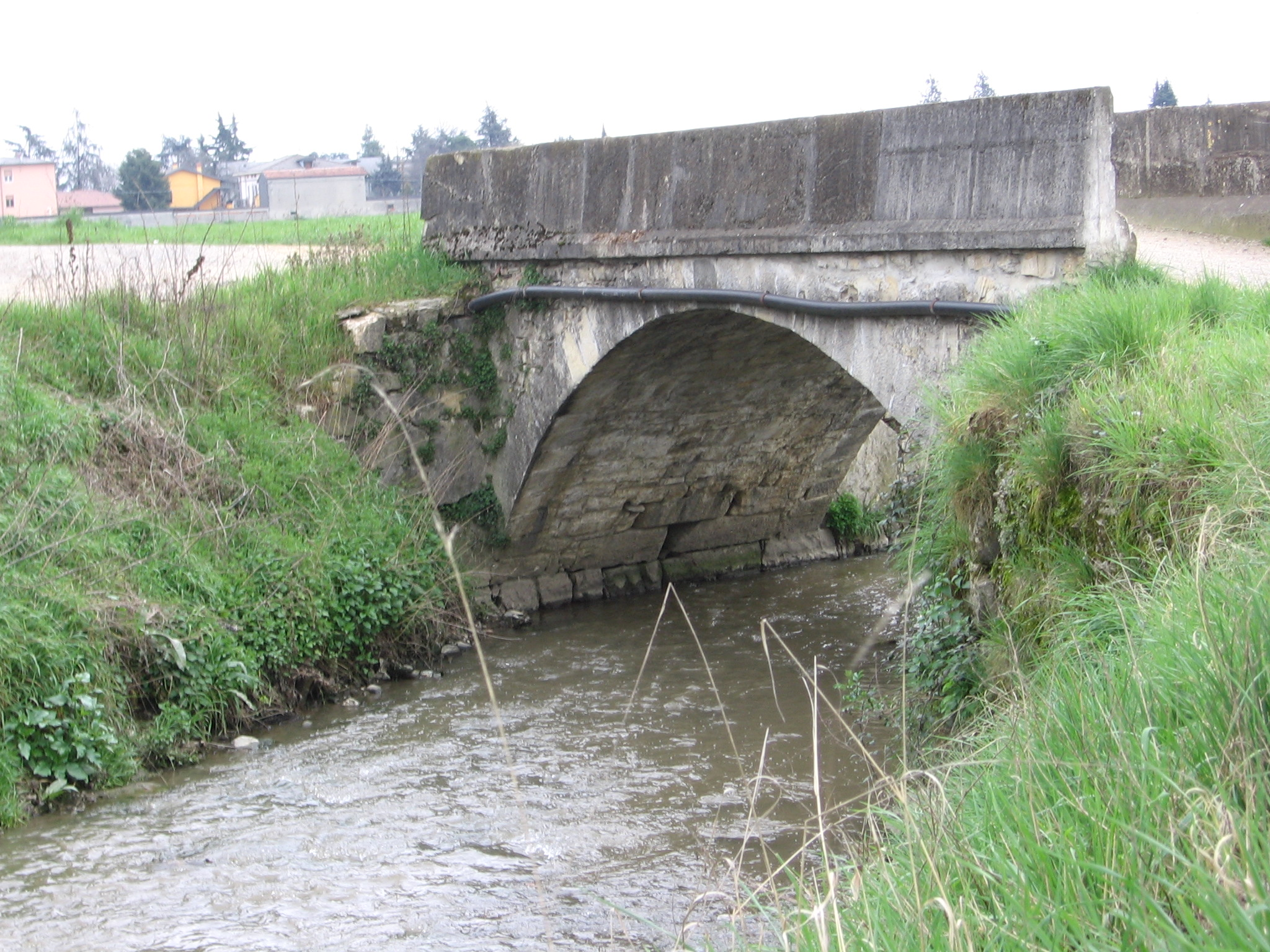 Mornico al Serio, Bergamo, Italia